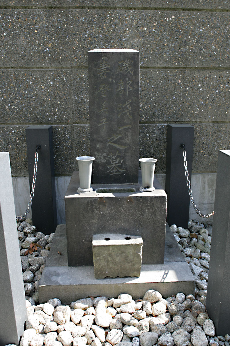 回向院（東京都 荒川区 南千住 5-33-13）にある磯部 浅一の墓 The grave of Asaichi Isobe in Ekoin